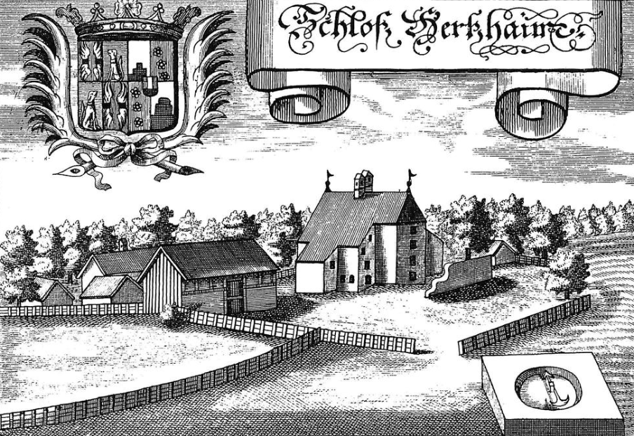 Schloss Heretsham mit Wappen